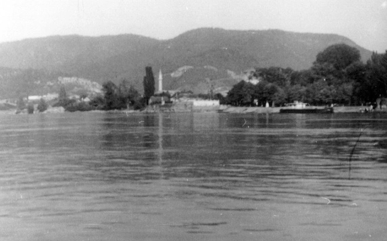 Ada Kaleh island